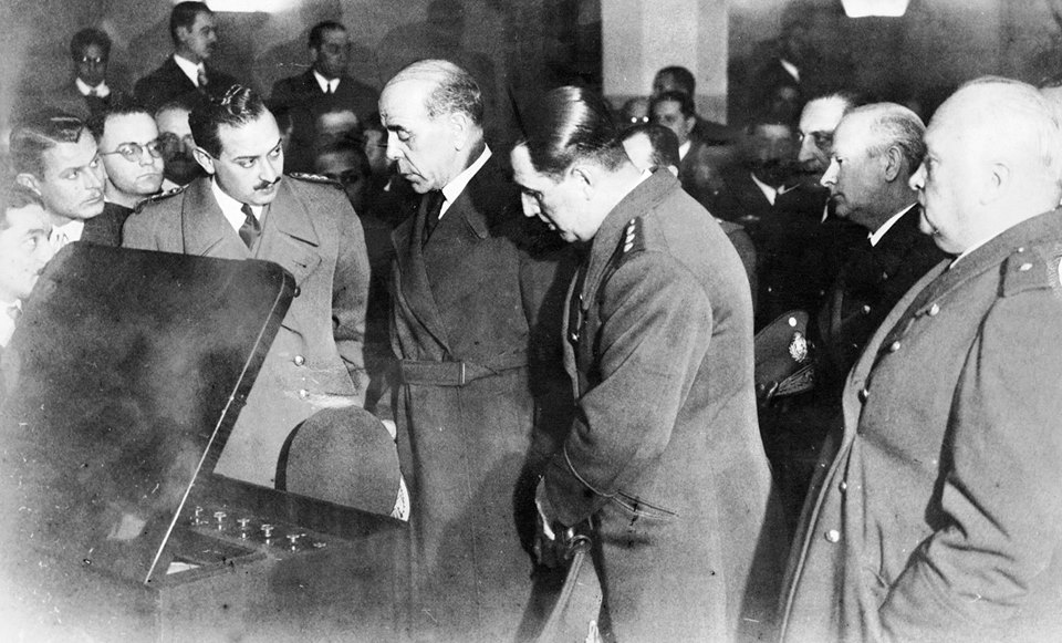 El dictador Edelmiro Farrell acompañado de sus ministros y el vicepresidente Juan Domingo Perón, observa la prueba experimental de televisión en la Argentina, 1944.